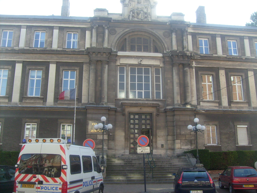 Palais de Justice de Dunkerque